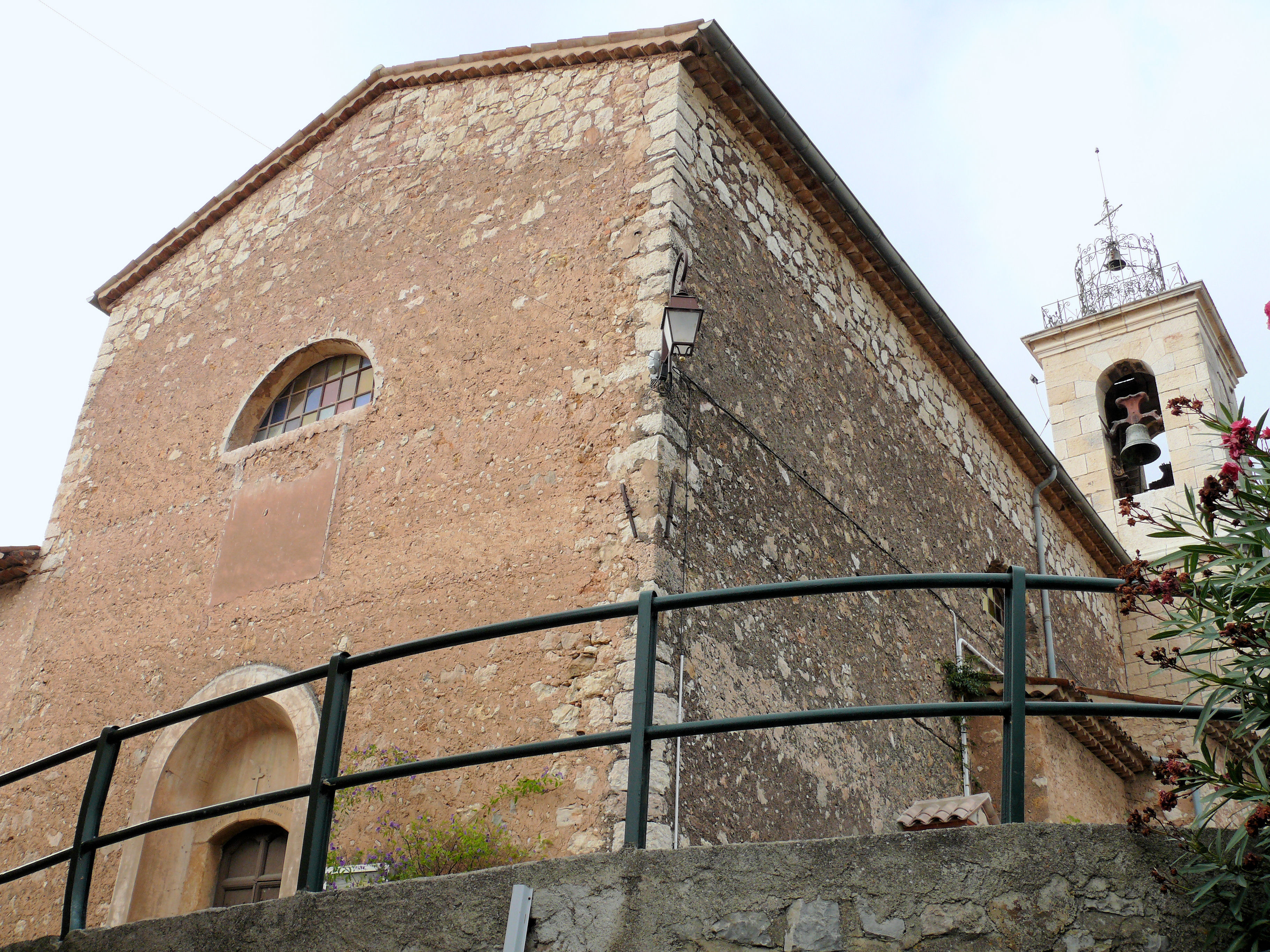 Spéracèdes - Eglise Saint-Casimir